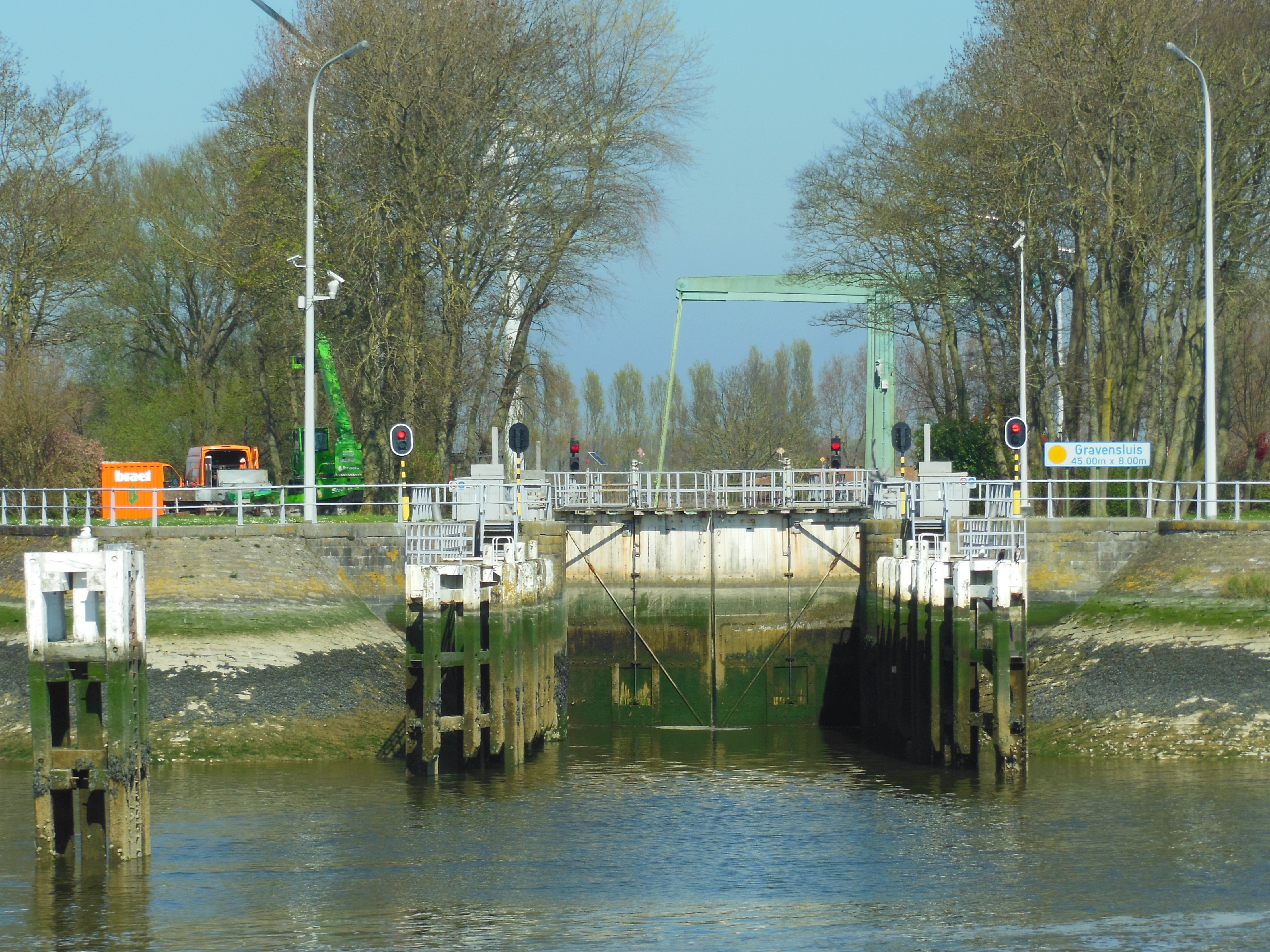 De toegang tot het Gravensas vanuit de zwaaikom